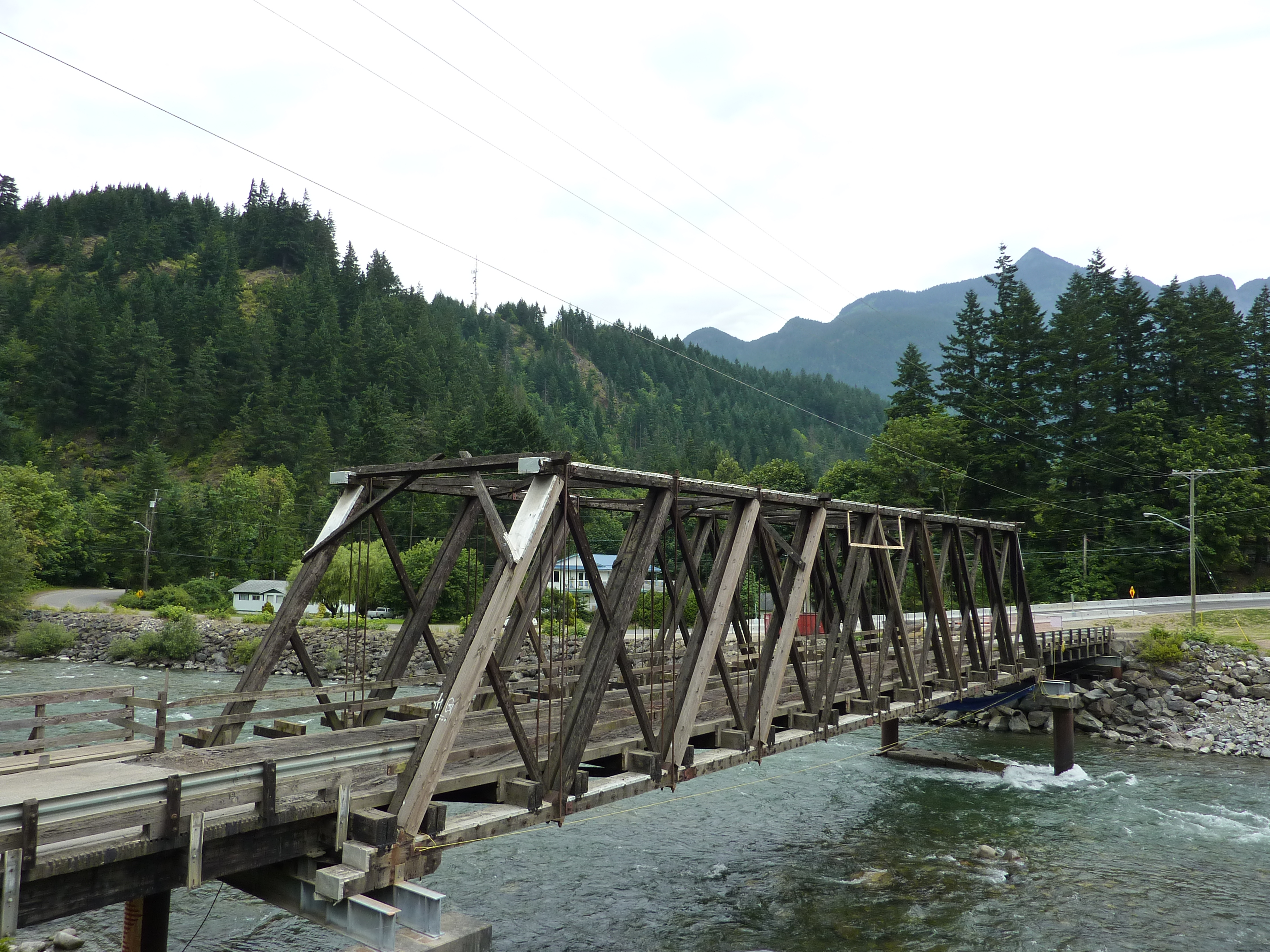 Coquihalla River Bridge in Hope, British Columbia